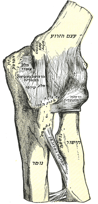 מרפק שמאל, מבט תיכון-קדמי